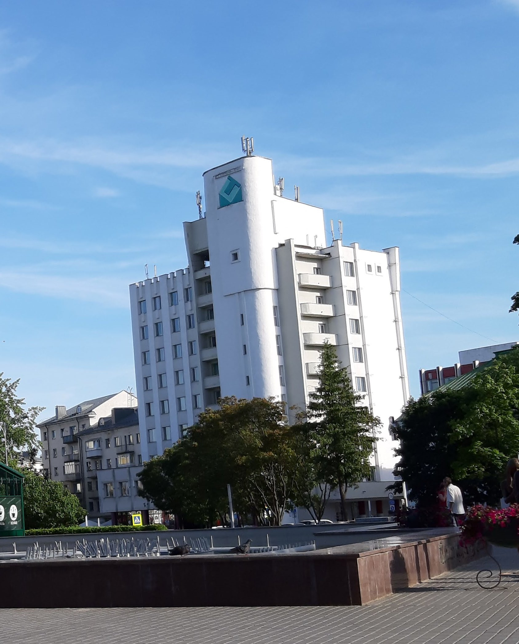 Магілёў. Сквер і Форум